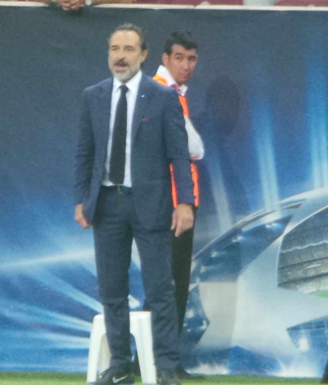 Cesare Prandelli Galatasaray'ın başındayken Anderlecht karşısında